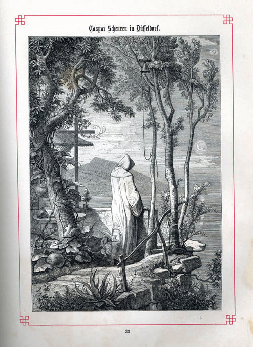 Illustration von Caspar Scheuren zu dem Gedicht "Der Einsiedler" von Joseph von Eichendorff.